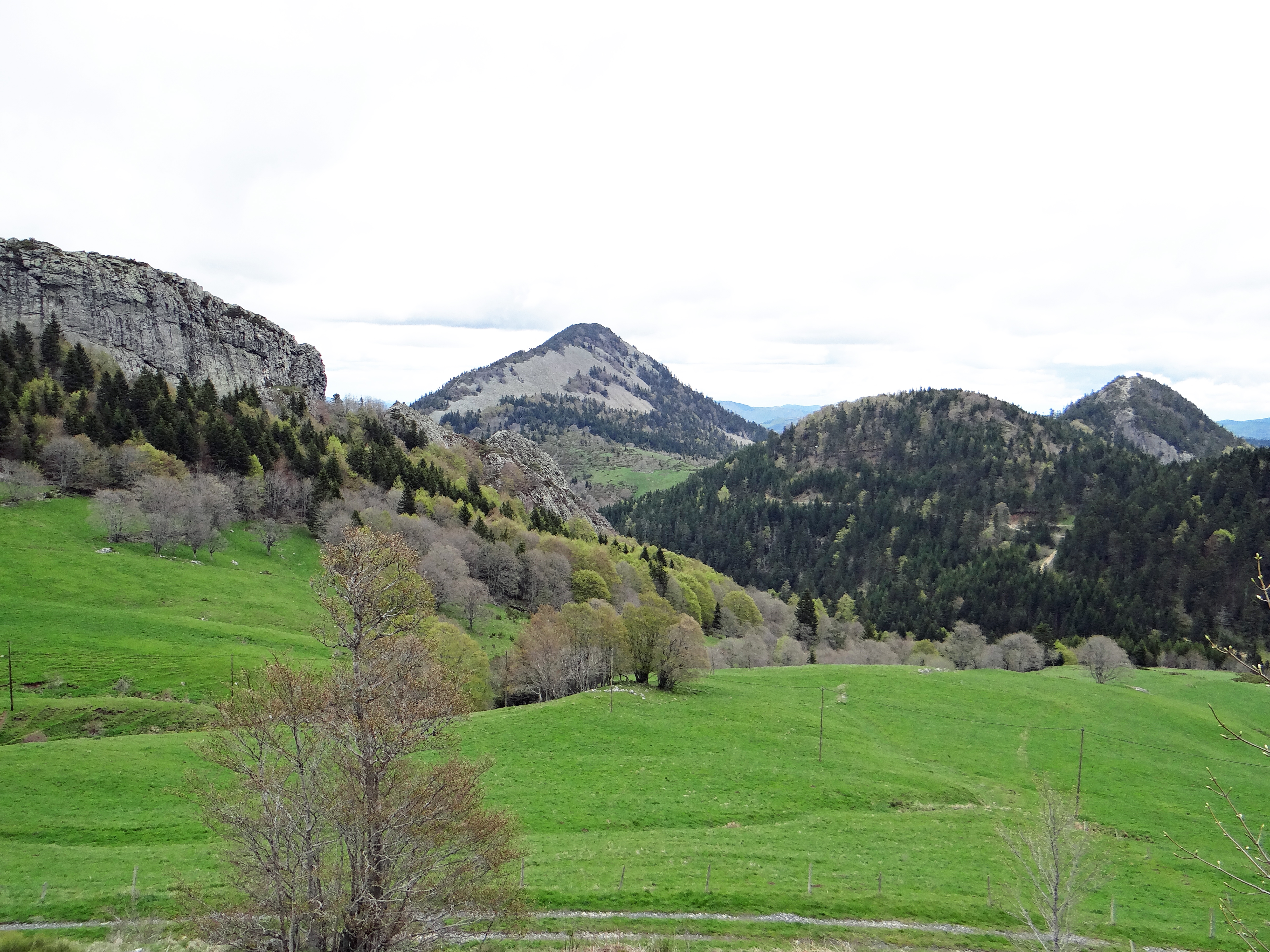 Le rocher des Pradoux, à gauche, et le Suc de Sara, vus du CD378